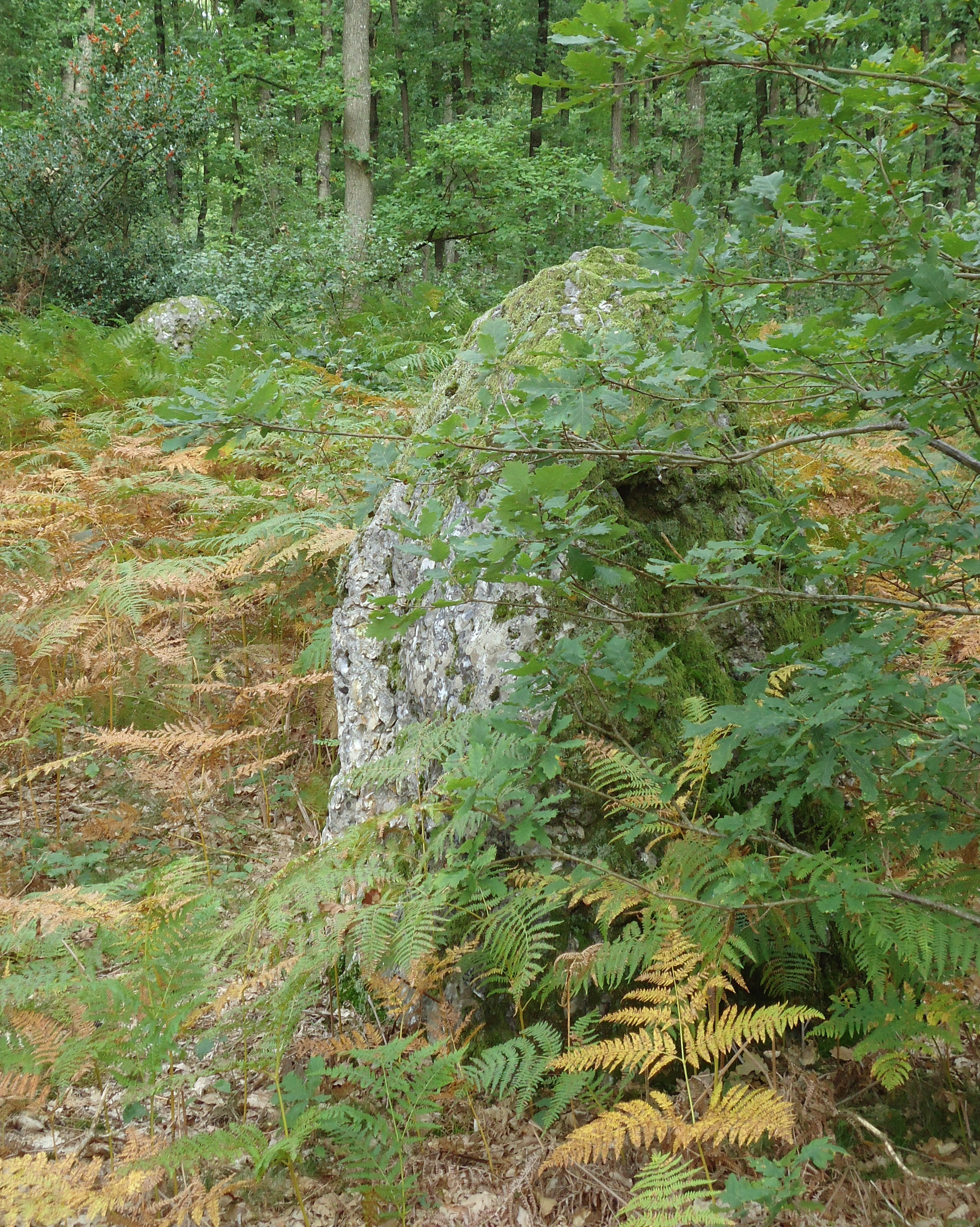 Menhirs 1 & 2 sur les trois de l'alignement